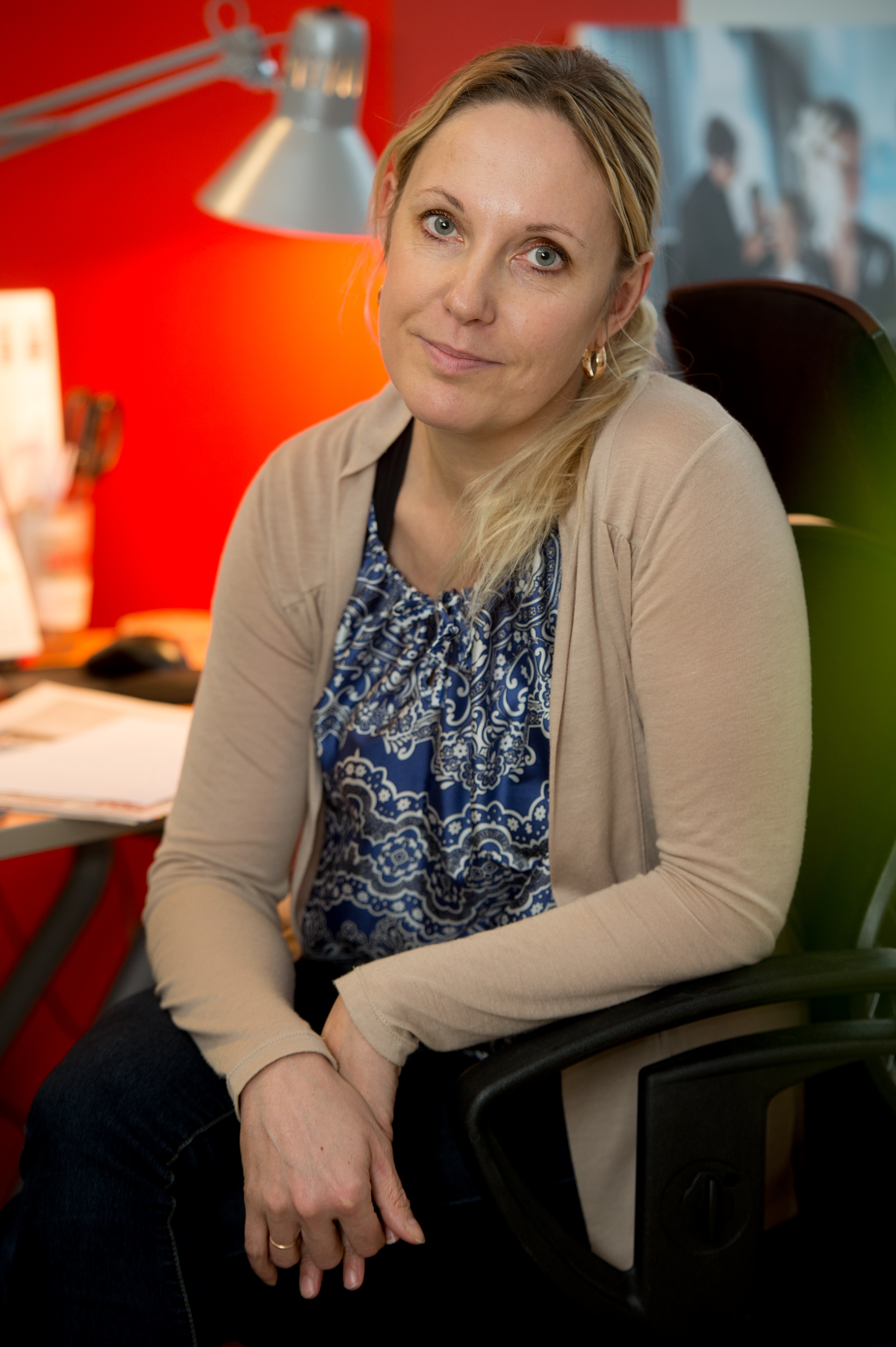 Kirsti Vainküla